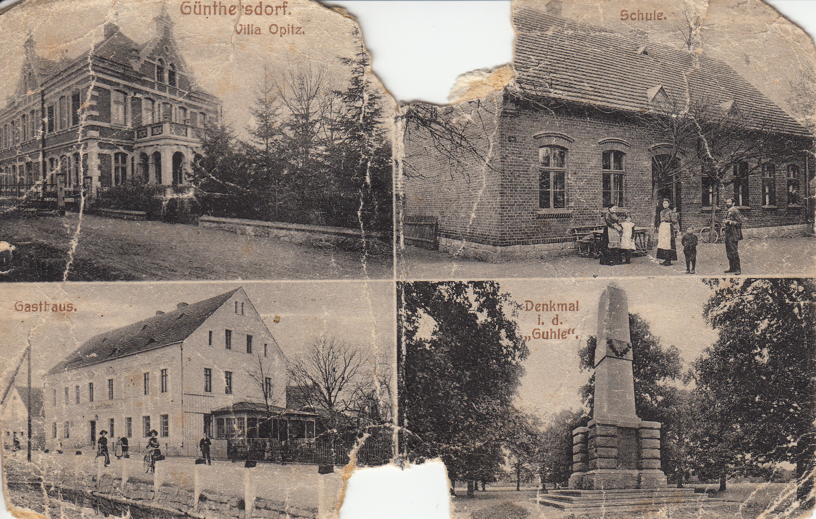 Ansichtskarte von Günthersdorf, Kreis Schweidnitz Anfang des 19. Jahrhunderts.